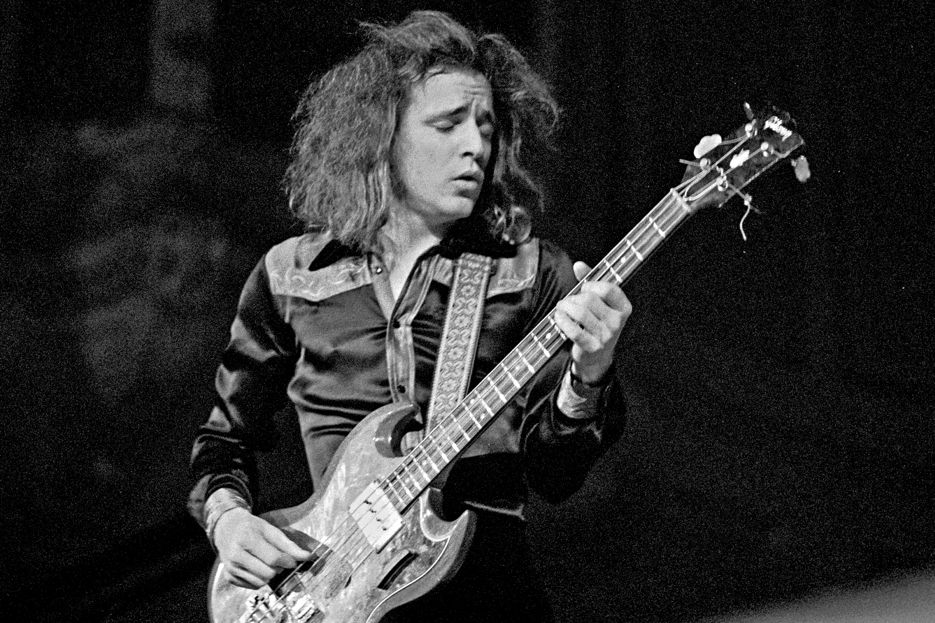 Jack Bruce 1001720034 Ex-Cream-Basssist und Sänger Jack Bruce in der Musikhalle Hamburg, January 1972